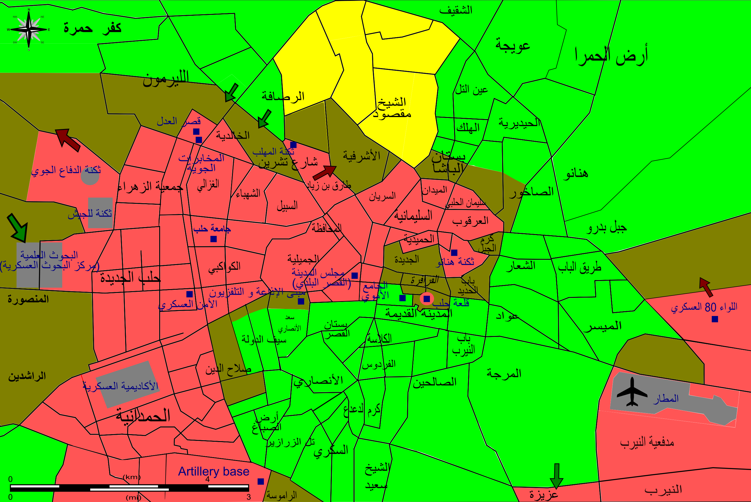 الوضع الميداني في مدينة حلب يونيو 2013 سيطرة لجيش السوري سيطرة المعارضة سيطرة حزب الإتحاد الديمقراطي السوري PYD (سيطرة الأكراد) إشتباكات جارية أو مناطق غير واضحة السيطرة